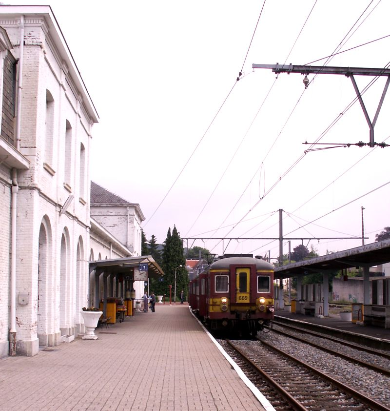 Gare de Spa